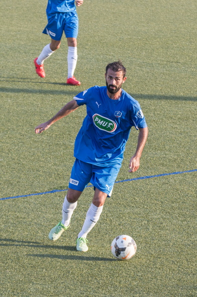 Nicolas Flégeau durant un match de Coupe de France Côte Bleue - Istres